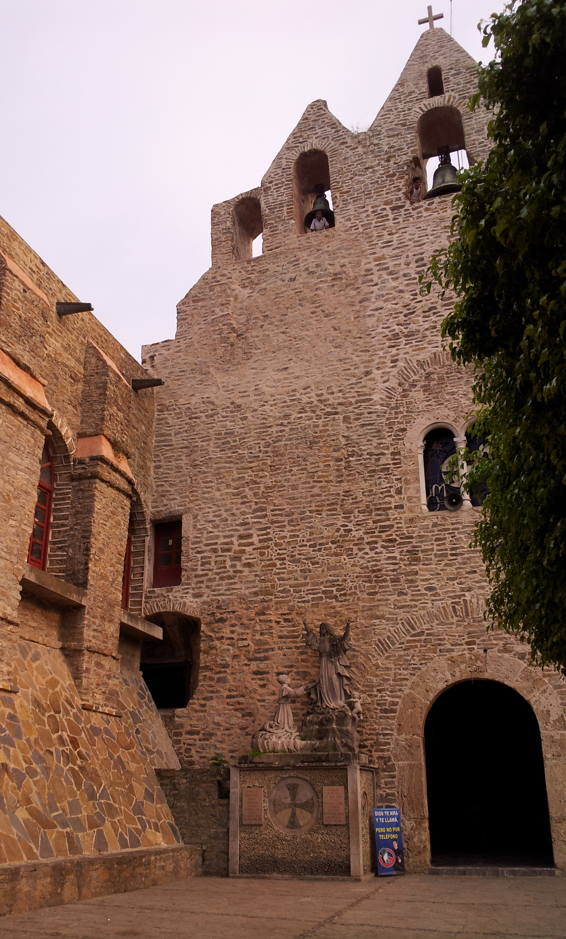 Catedral de Huejutla 2.1 (Android).